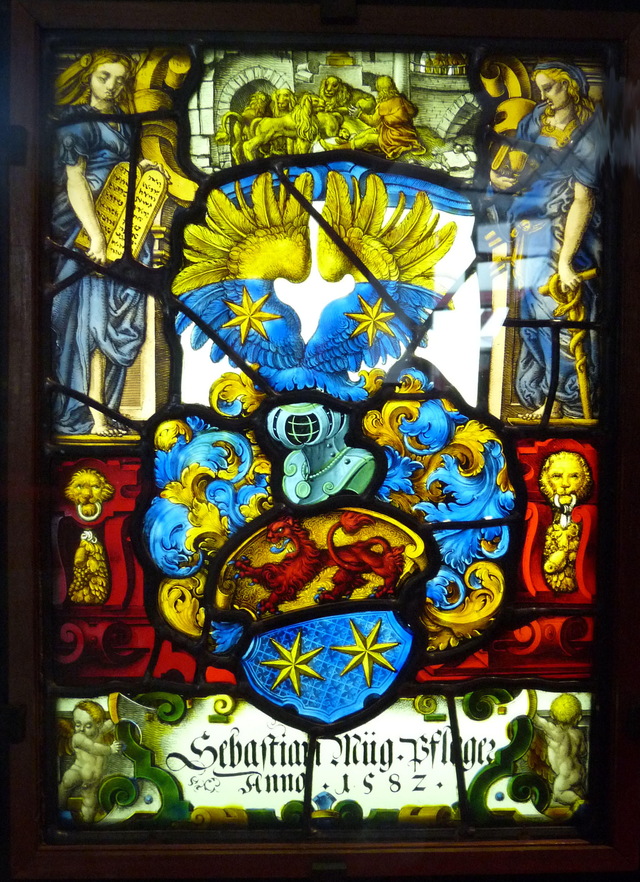 Vitrail aux armes de Sebastian Mueg (1520-1609), riche négociant et Stettmeister de Strasbourg, 1582, Musée historique de Strasbourg